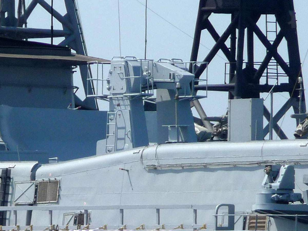 Кормовая пусковая установка 3С-90 ЗРК «Штиль» на эсминце D61 «Дели» ВМФ Индии. Снято во время визита индийских кораблей во Владивосток 19.04.2011 г.